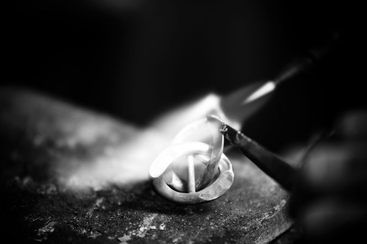 Erstellung eines Armbandes